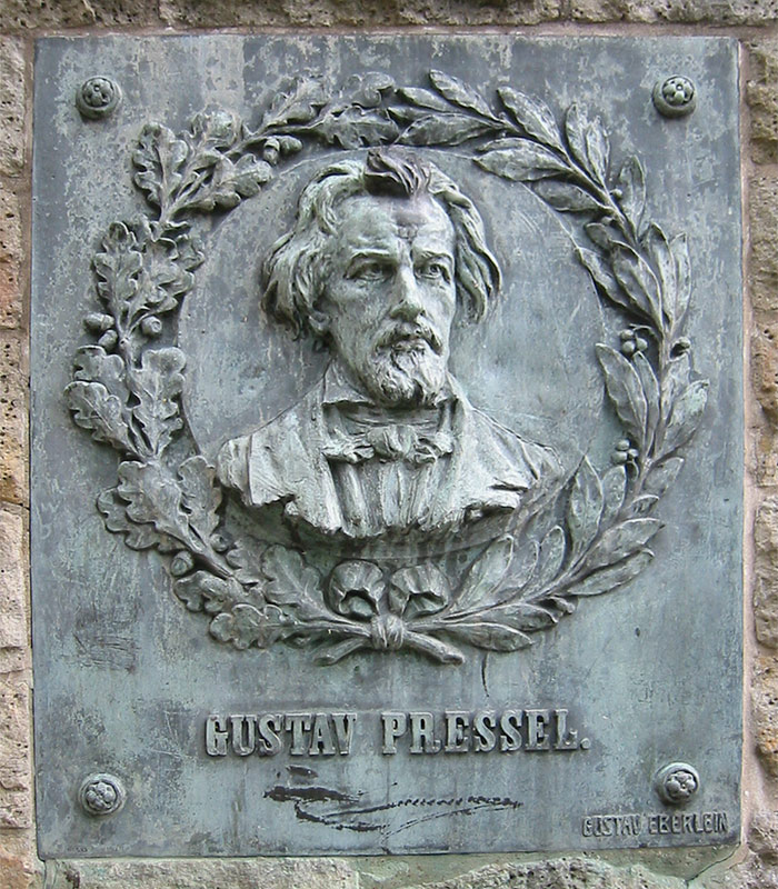 Bronzetafel "Gustav Pressel" an der Weserliedanlage Vom Bildhauer Gustav Eberlein gestaltete Bronzetafel an der Weserliedanlage in der Stadt Hann. Münden. Abgebildet ist der Komponist der Melodie des Weserliedes, Gustav Pressel.